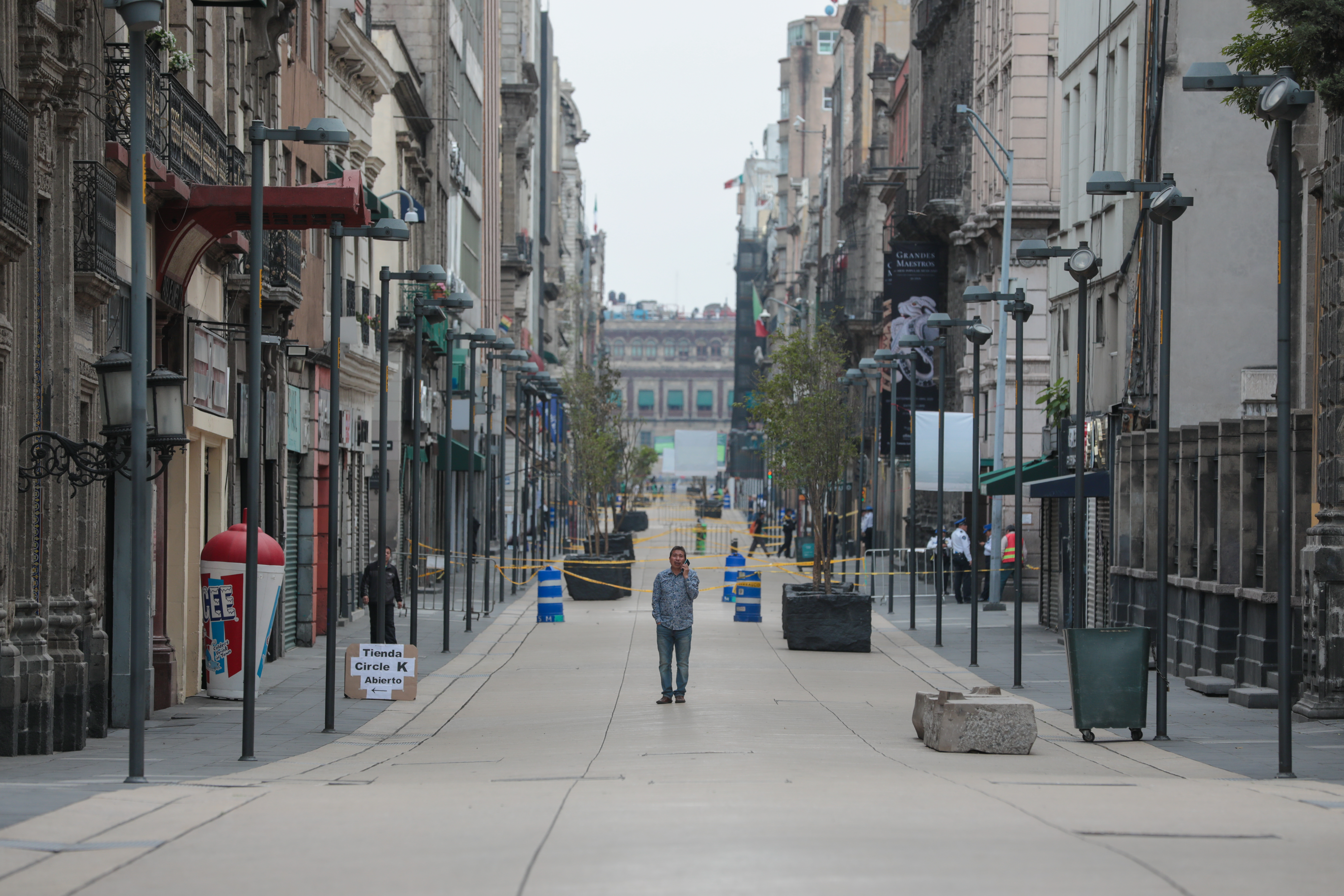 La avenida Madero, en el Centro Histórico de la Ciudad, es uno de los espacios cerrados al público durante la emergencia sanitaria.